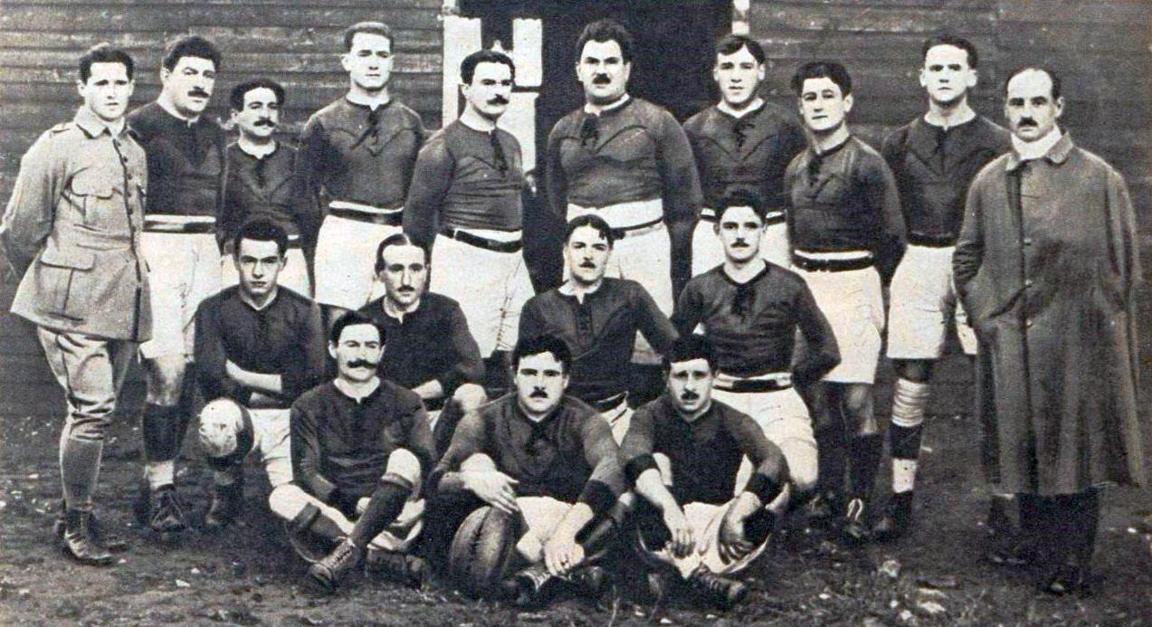 L'AS Bitteroise en décembre 1920.